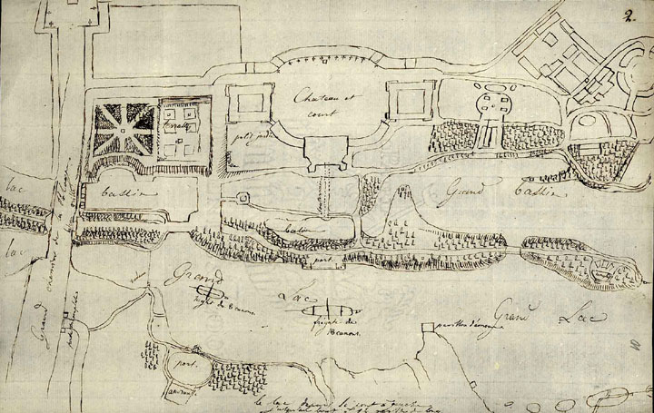 Ситуационный план расположения дворца и парка в Гатчине